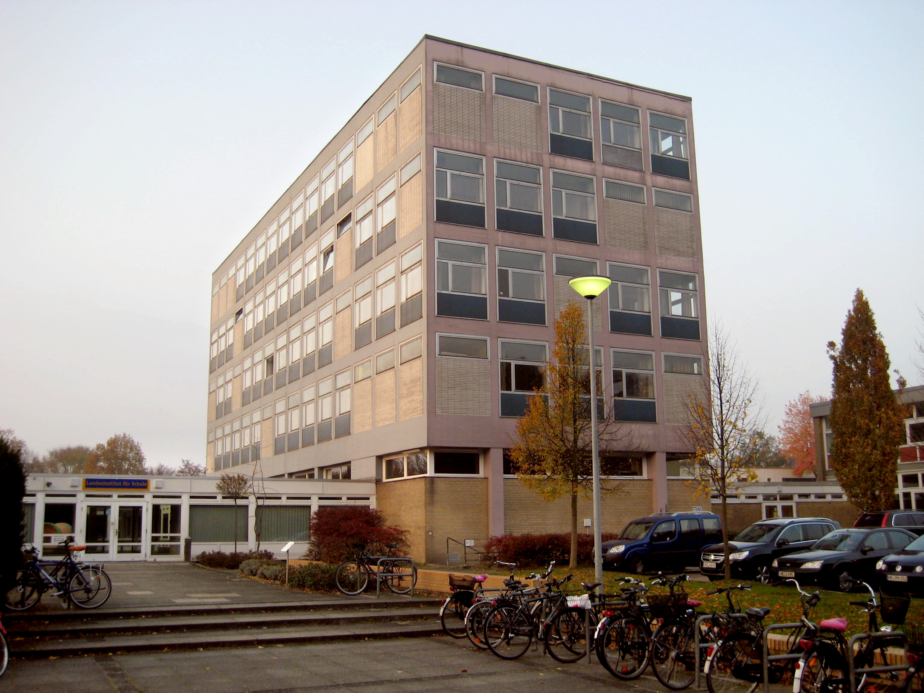 Landesinstitut für Schule (LIS) der Freien Hansestadt Bremen – Haupsitz des LIS in Bremen-Findorff, Am Weidedamm.